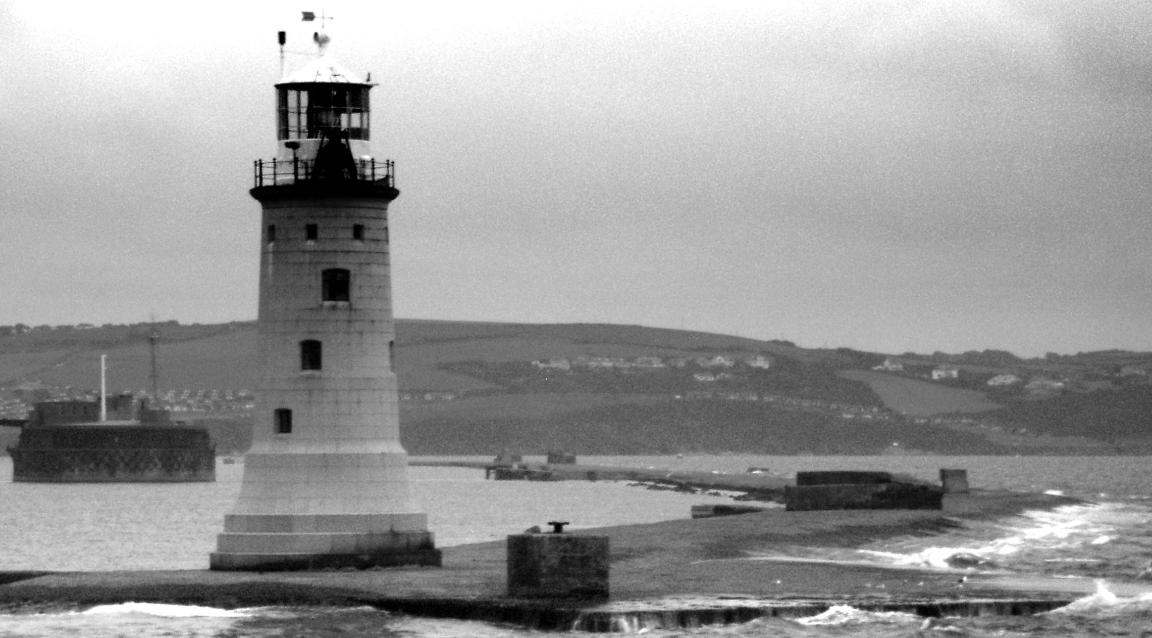 gloomy weather - gloomy day